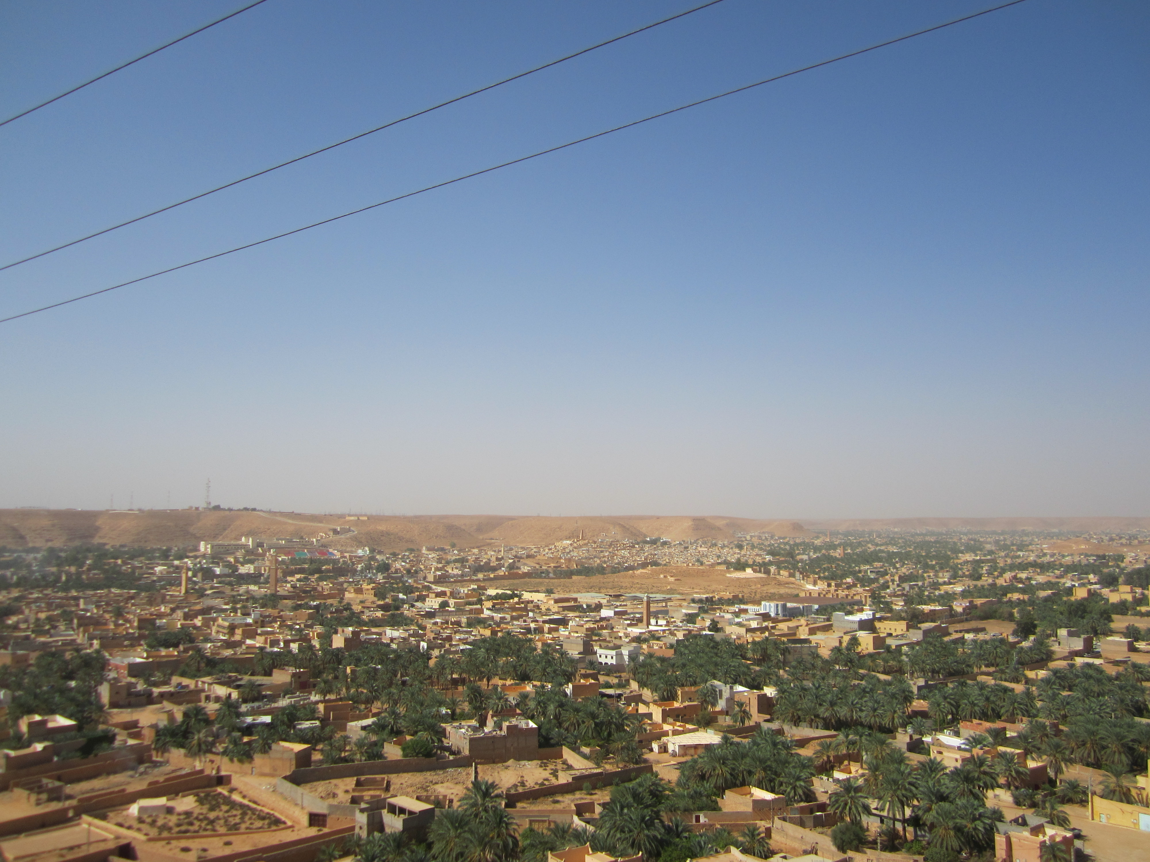 Ghardaia